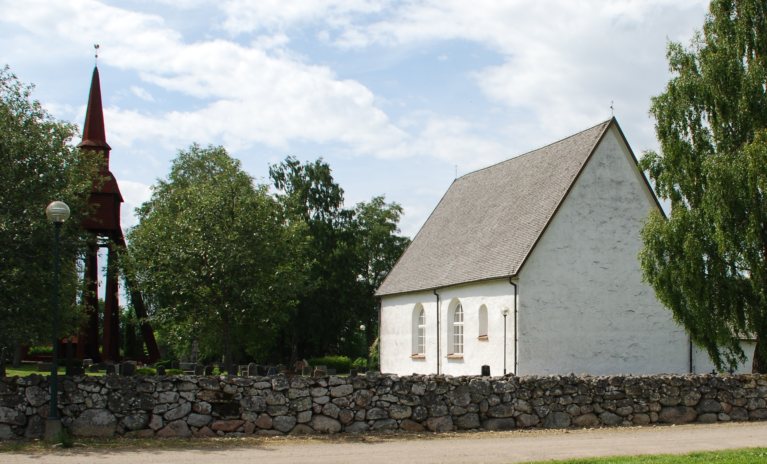 Tagalog: Lekaryd kyrka och klockstapel